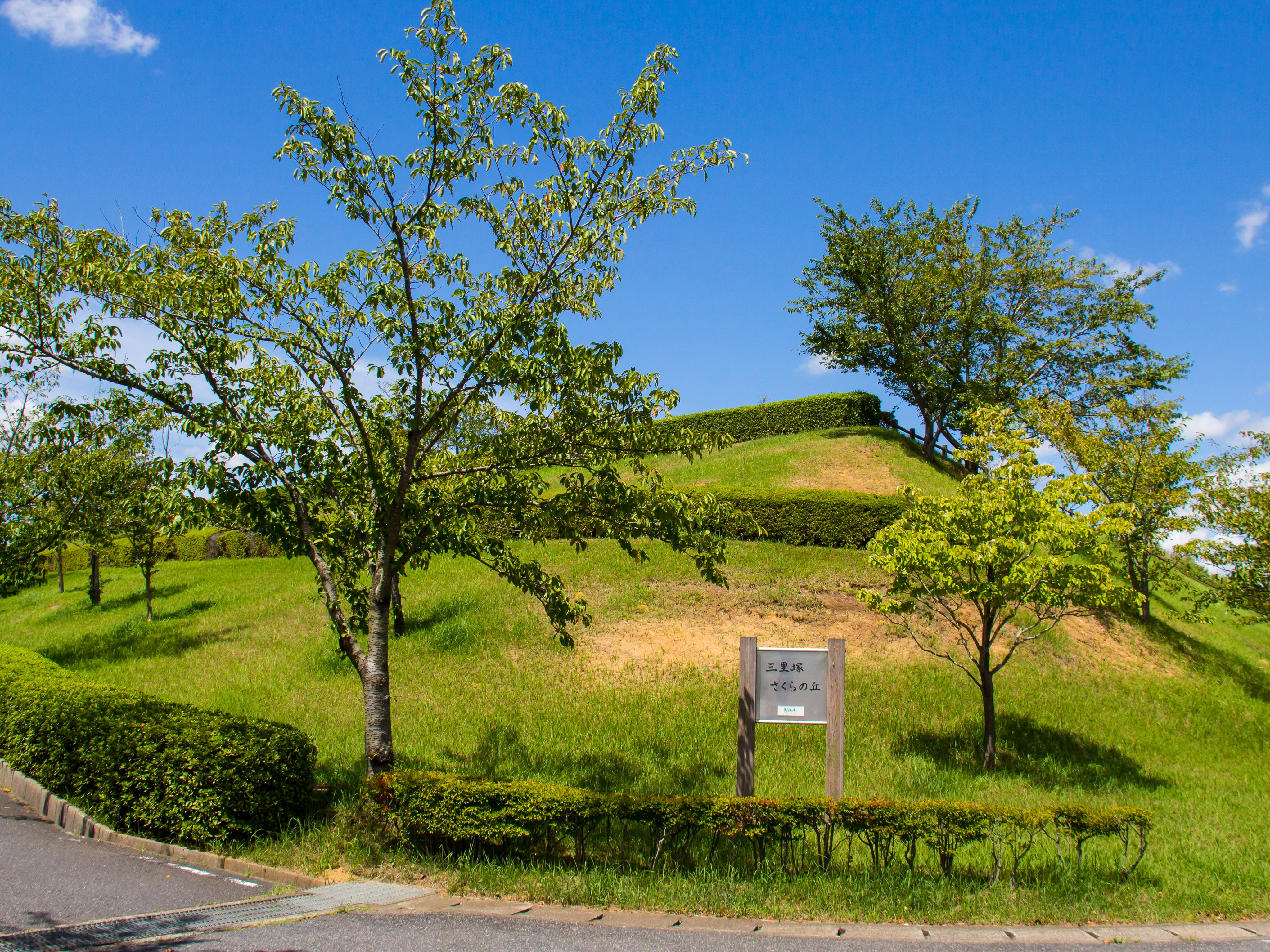 千葉県成田市・三里塚さくらの丘